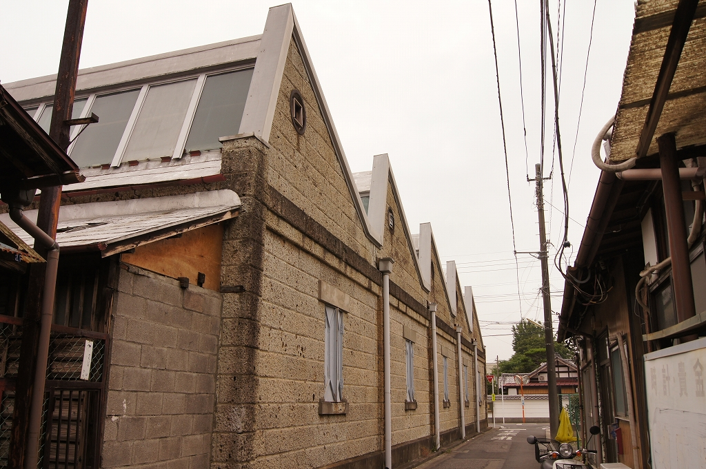 旧曽我織物工場。北からの安定した採光を得られるノコギリ屋根の工場。ここには市内でも数少ない石造りの建物が残されています。